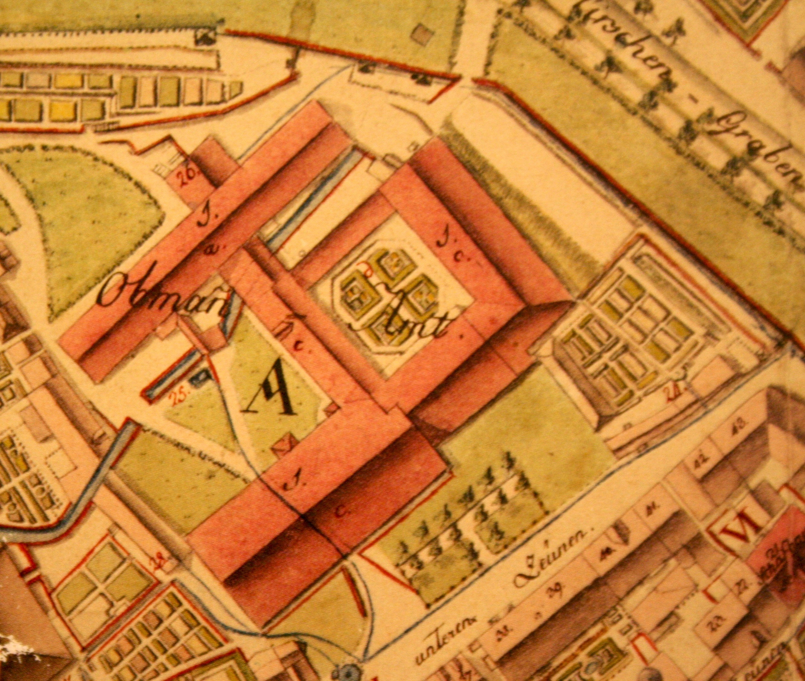 Barfüsserkloster auf dem Müllerplan von 1793